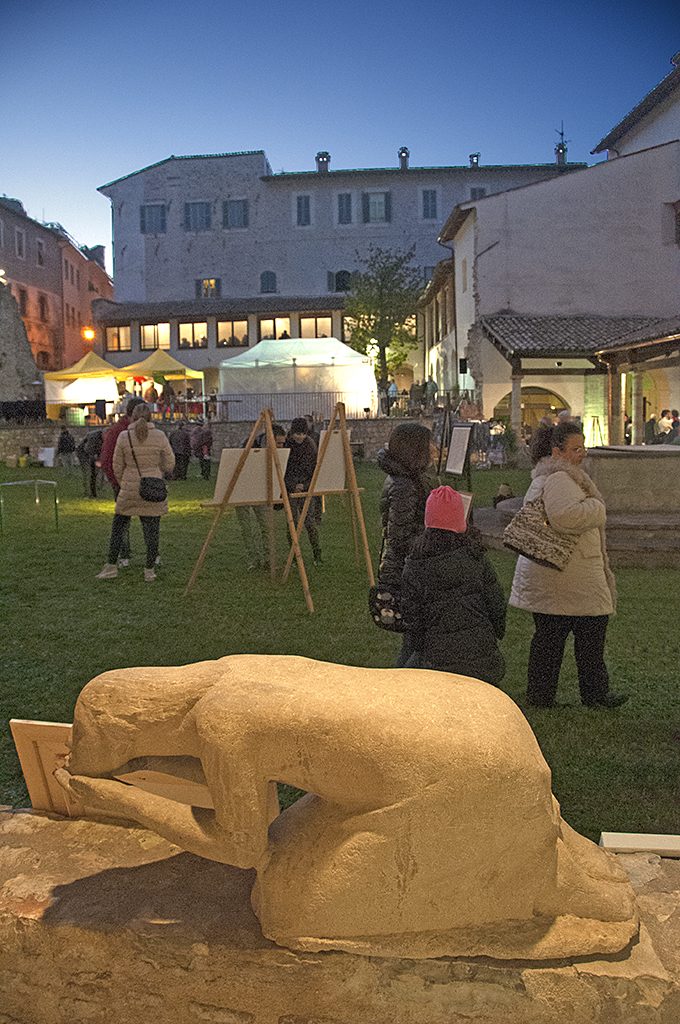 Spoleto - Chiostro di San Nicolò; La donna che beve